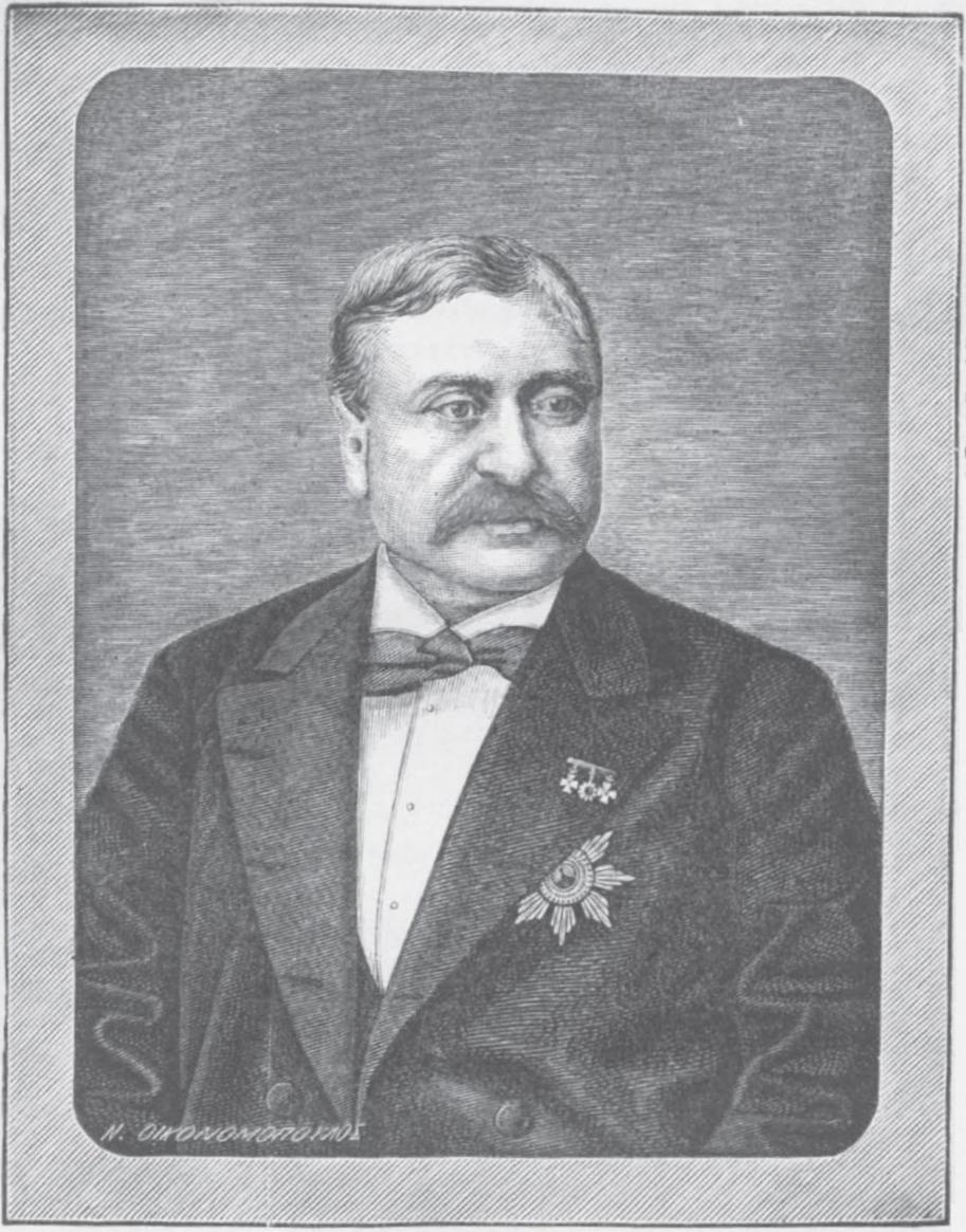 nahmhafte Griechische Persönlichkeit, 19. Jahrhundert